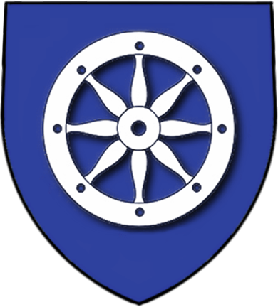 Erb rodu Redernů: na modrém štítě stříbrné kolo (před rokem 1562)